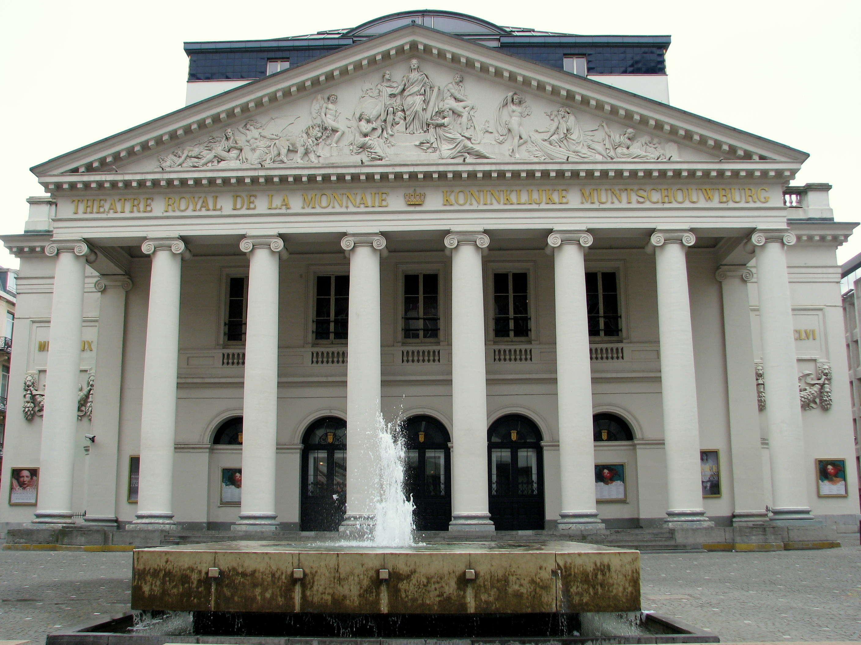 Koninklijke Muntschouwburg Brussel